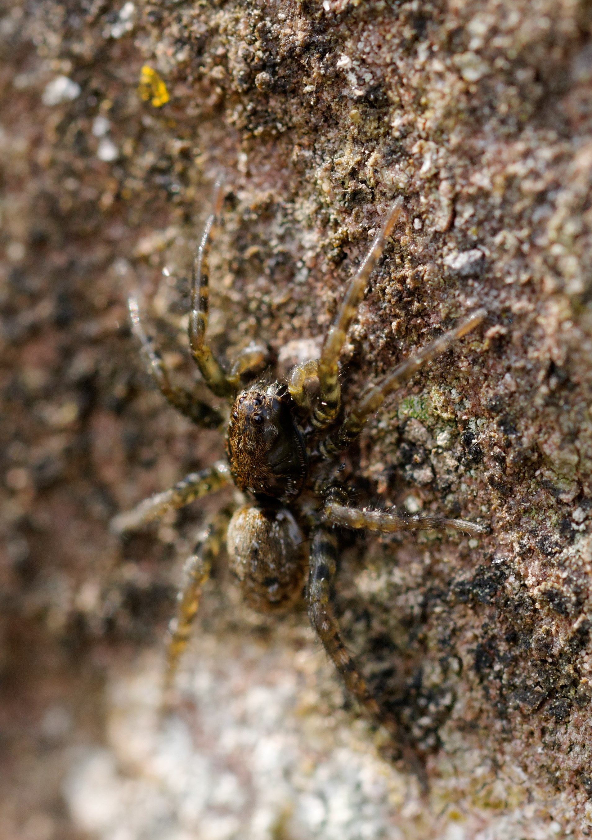 Araignée (Arctosa sp.).